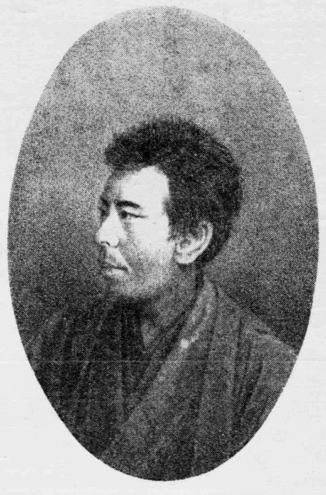 昭和5年9月『公私月報』に掲載された飯島虚心の肖像。